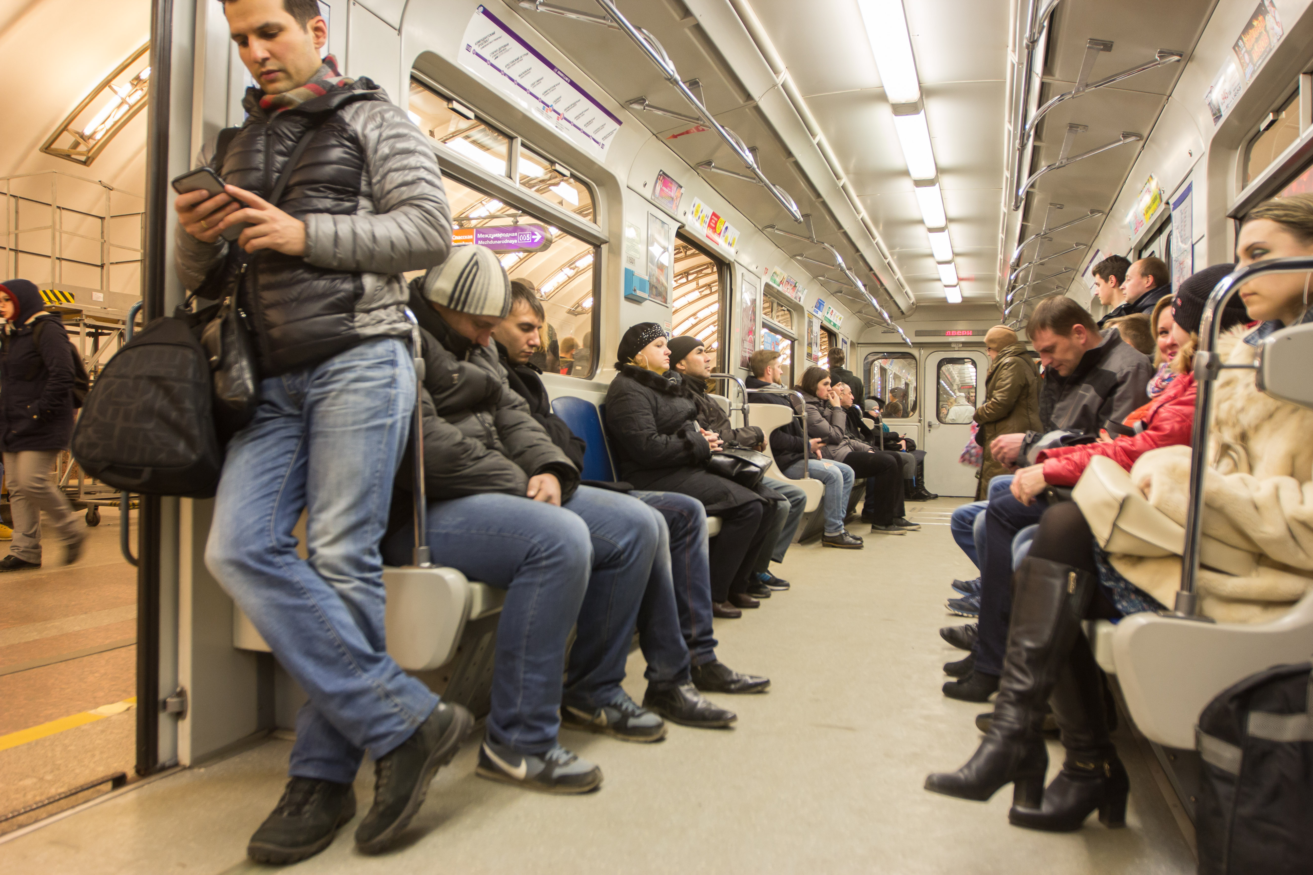 Vue de la station de métro Sadovaya (Ligne 5) du métro de Saint-Pétersbourg (Russie)